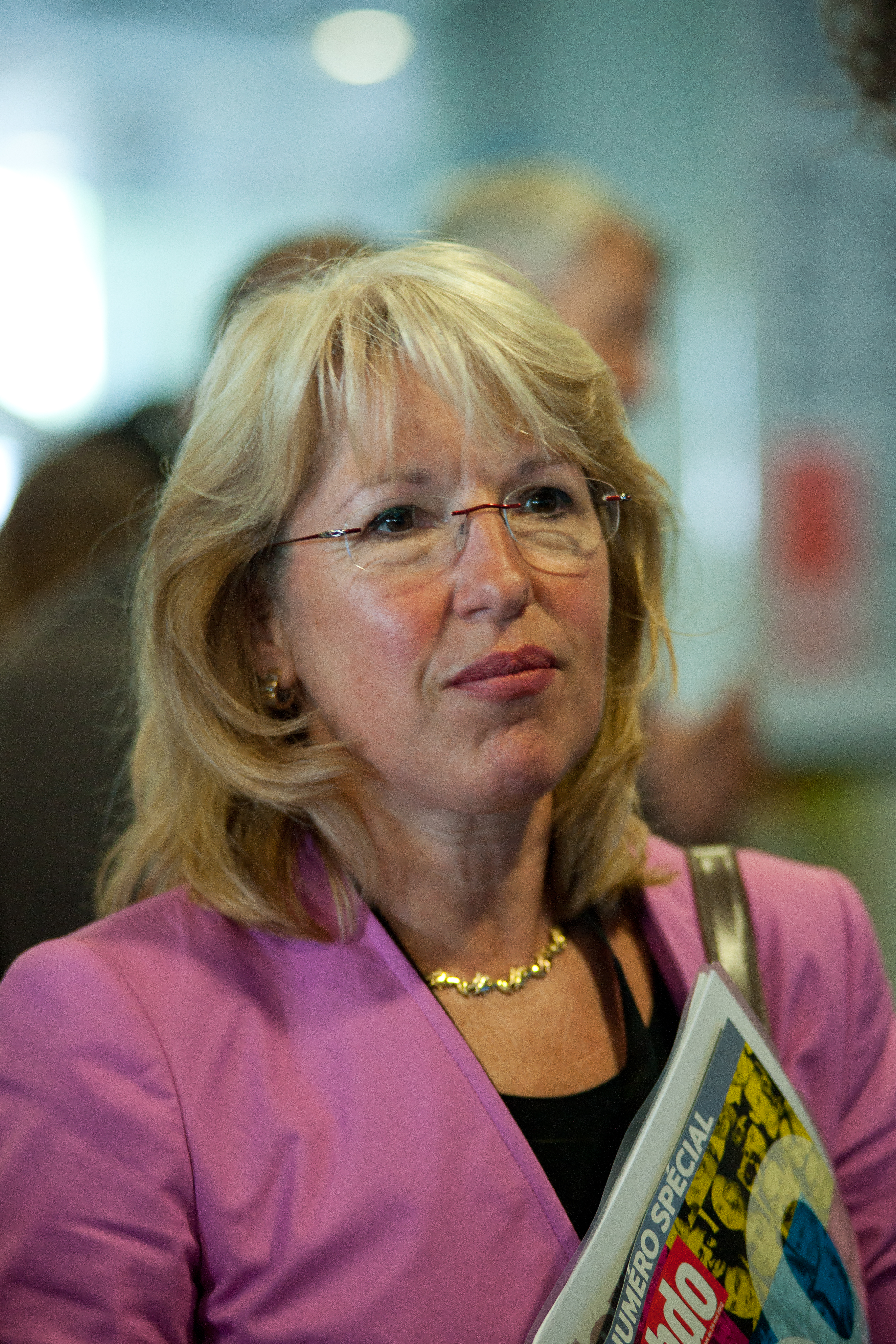 Jacqueline de Quattro au forum des 100 en 2012.